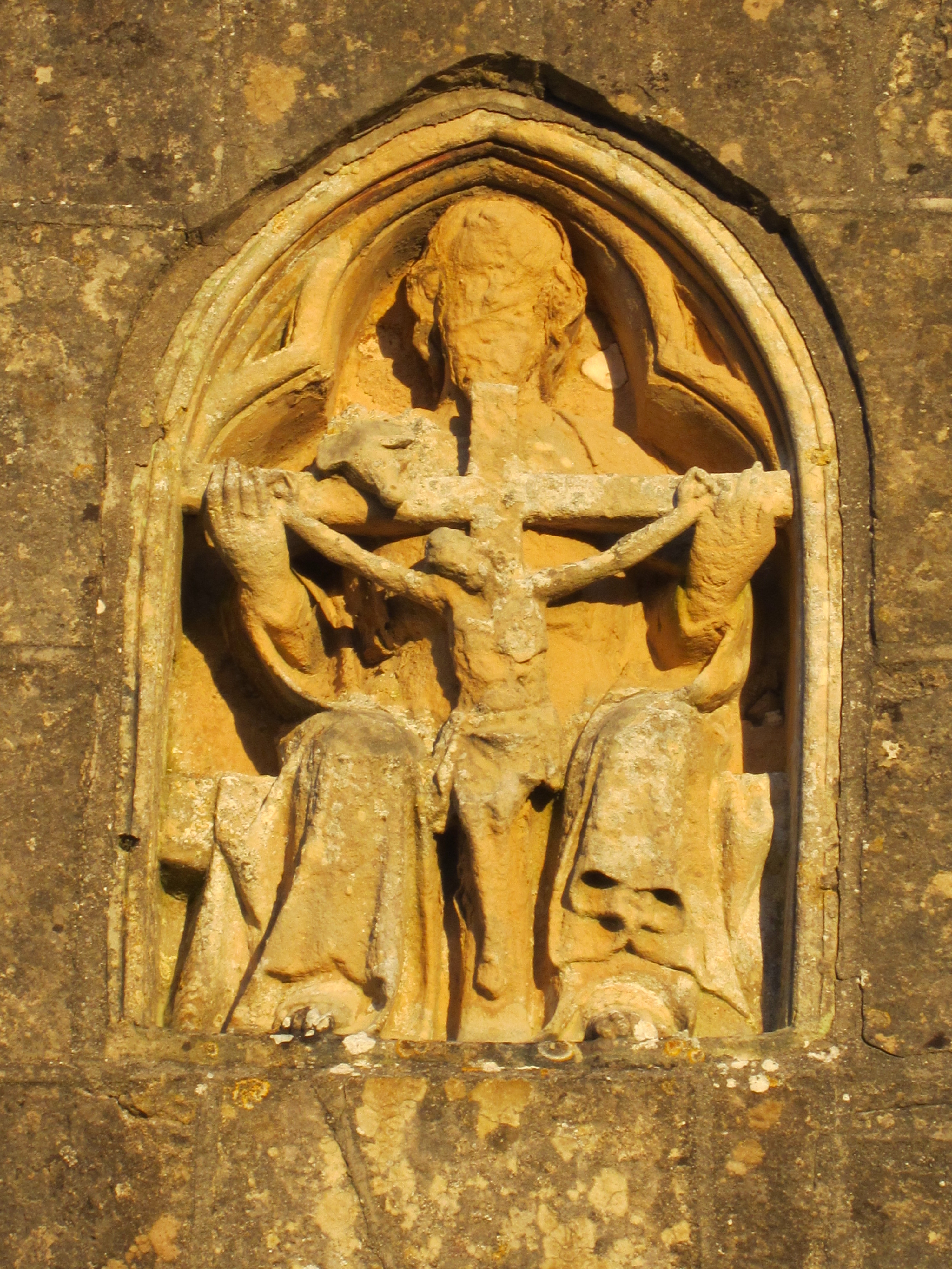 Église Sainte-Trinité de Teurthéville-Bocage